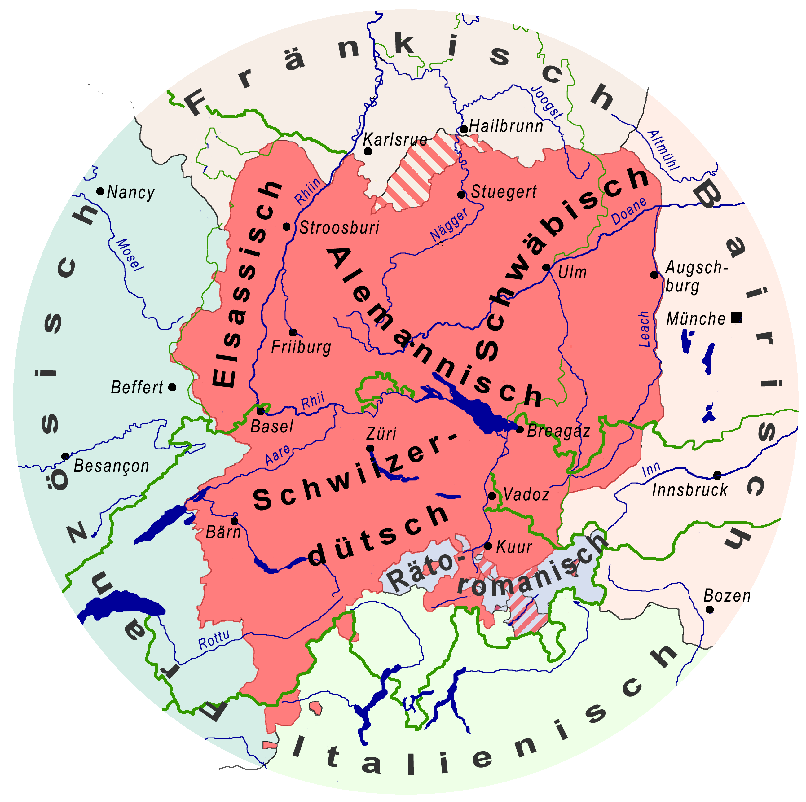 Charte vom alemannische Sprochruum mit de vier Hauptdialekt: Schwäbisch (Schwaben), Elsassisch (Elsass), Alemannisch (Baden) und Schwyzerdütsch (Schwyz)